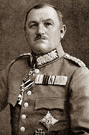 Andreas Heinrich Eugen Ritter von Zoellner (* 18.8.1866 in Regensburg, + 19.2.1945 in Berlin) war ein bayrischer General im 1. Weltkrieg